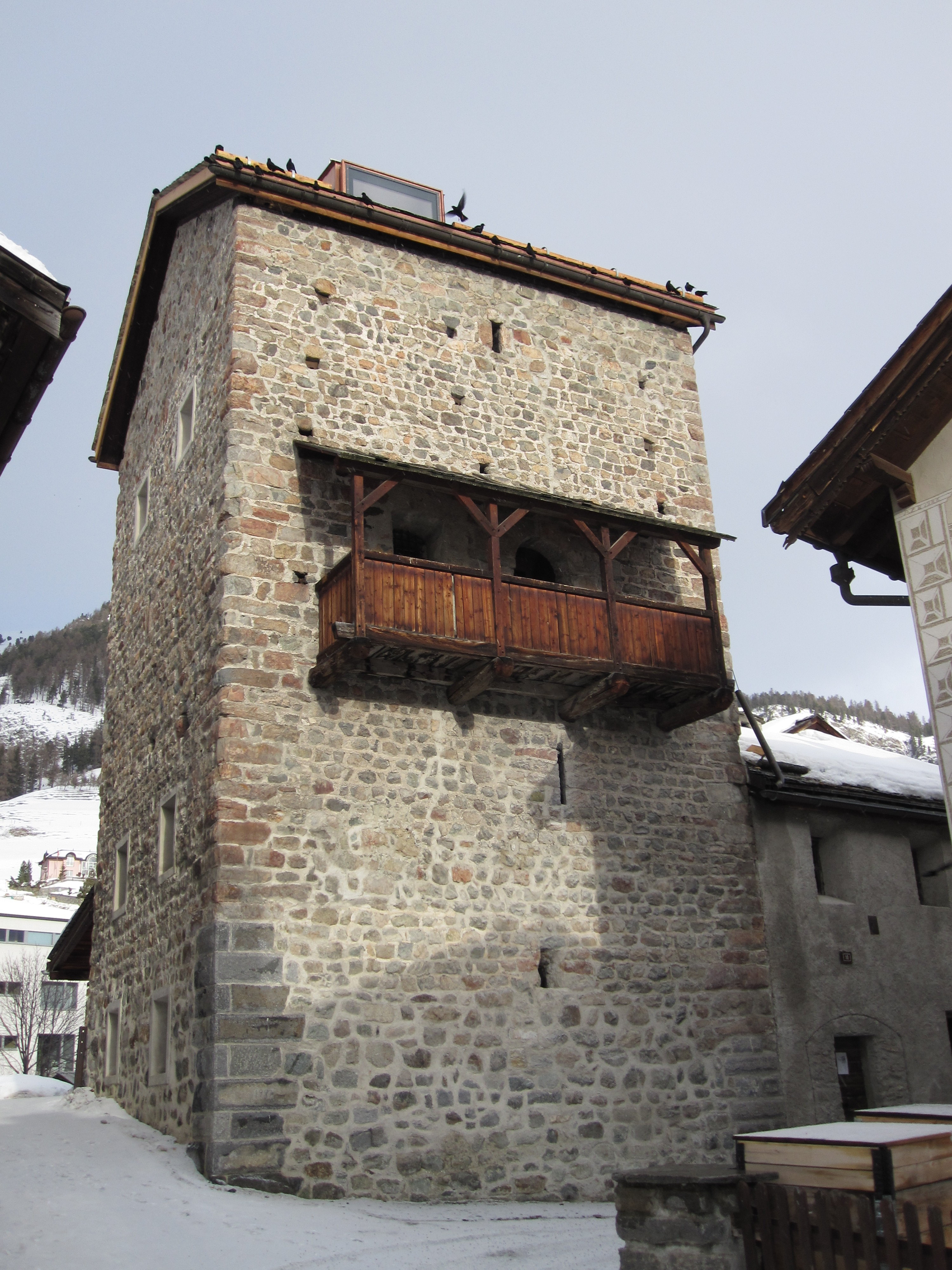 La Tuor in Samedan (Oberengadin, Kanton Graubünden)